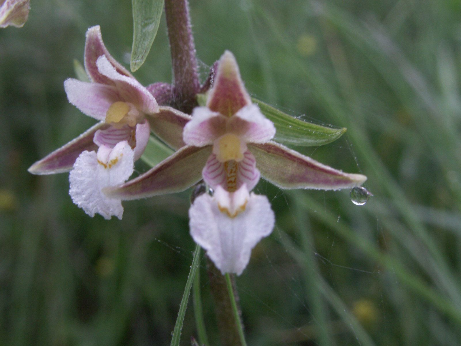 Epipactis palustris, Niedermoor, Litauen